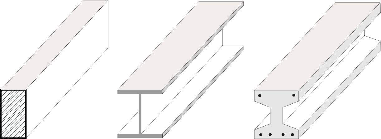 schema van balken. Balk van hout, staal en gewapend beton. Martink. 4 febr 2007